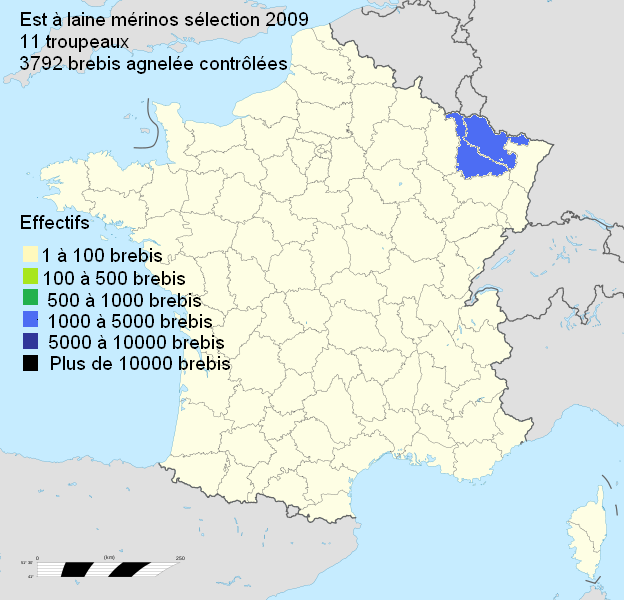 Localisation du berceau d'élevage de la race ovine Est à laine Mérinos en France